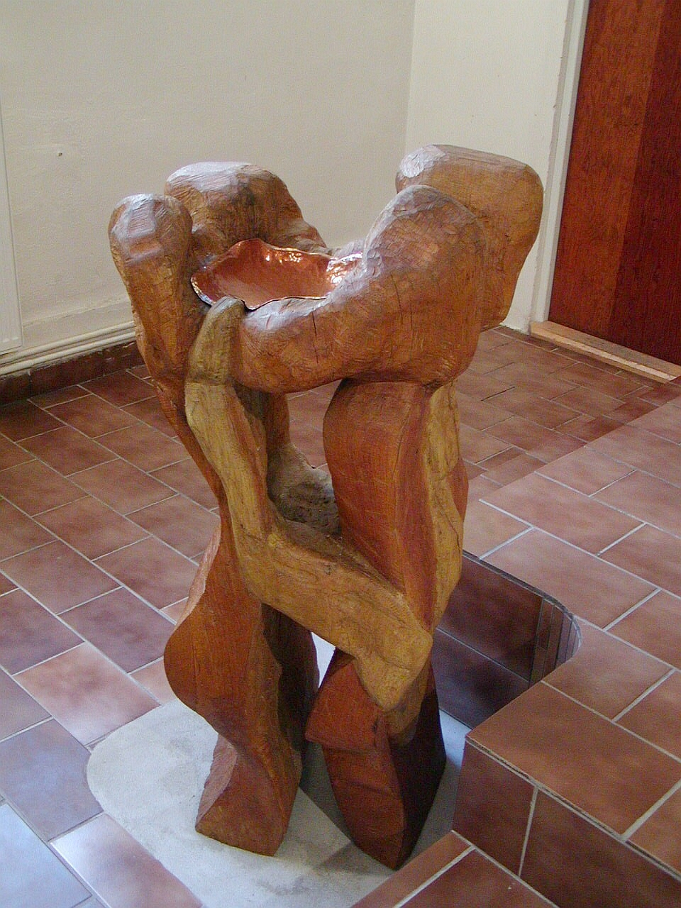 Křtitelnice ve strašnickém sboru ČCE v Praze-10, dílo Ivana Jilemnického